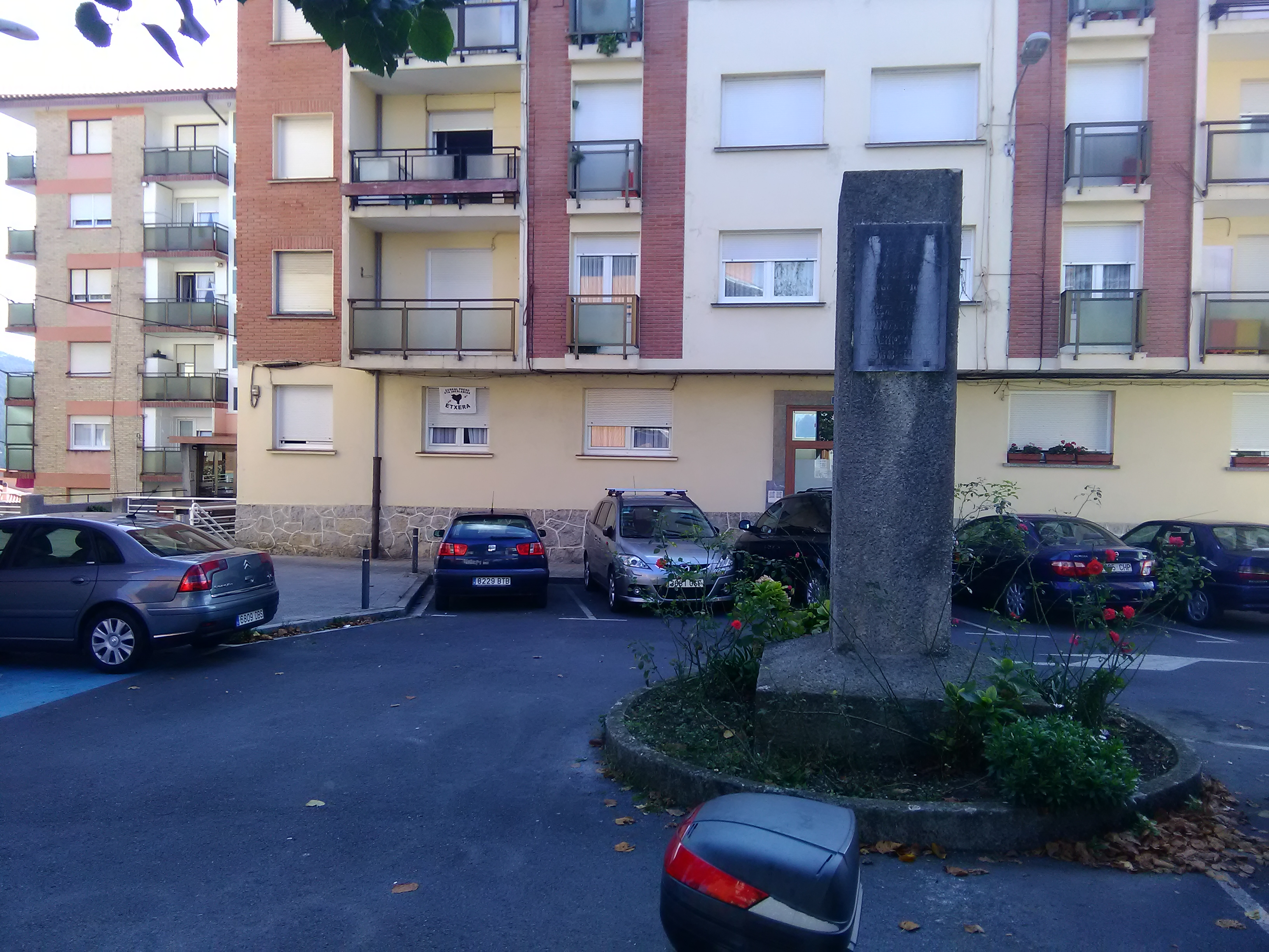 Lekeition, Joseba Aldamiz-Etxebarriaren izena daraman auzoan bere omenezko monumentua.